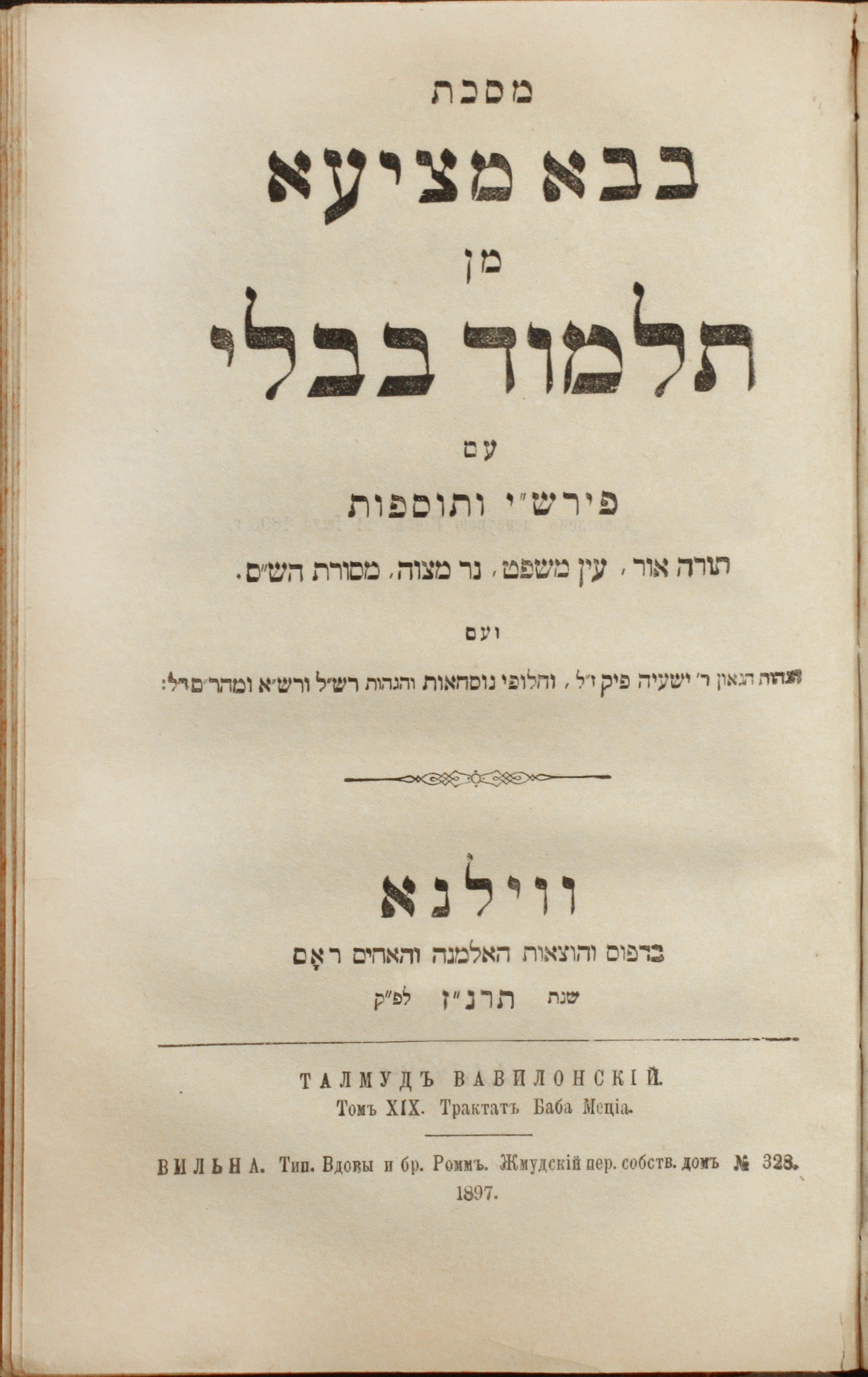 Виленский ШАС, Титульный лист 19-го тома